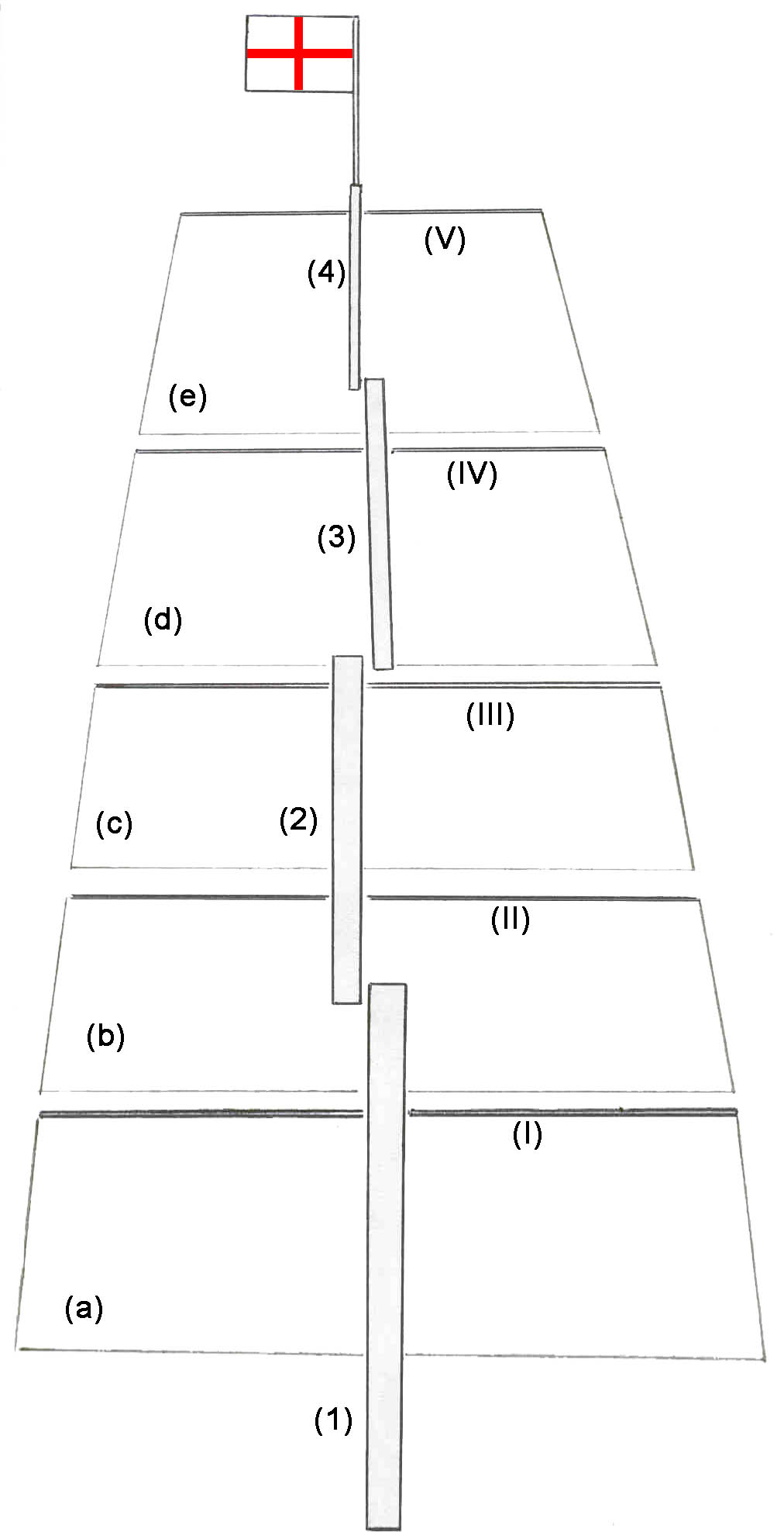 Autore: Emiliano Deghenghi Creata dall'utente per la realizzazione di questa voce